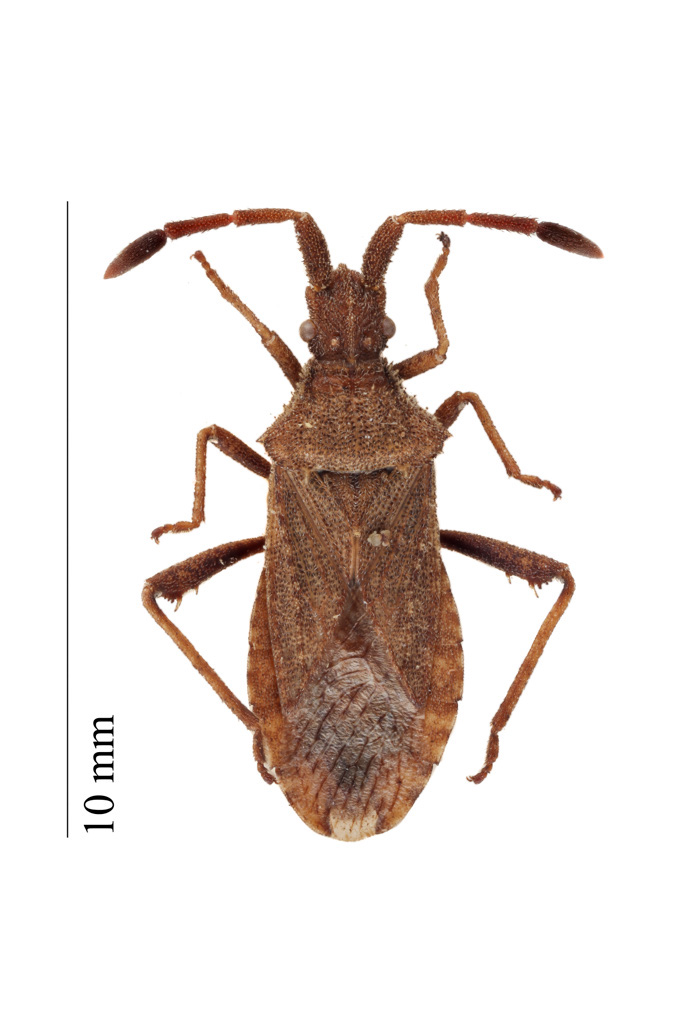 Coriomeris scabricornis